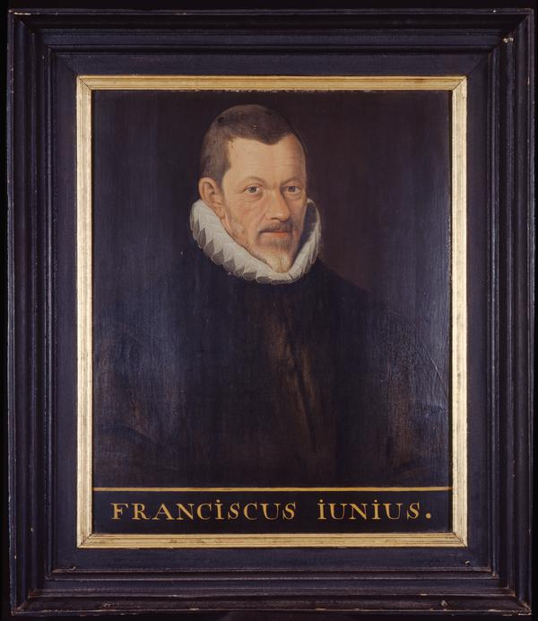 Portret van Franciscus Junius, hoogleraar Godgeleerdheid en Hebreeuws te Leiden Icones 35